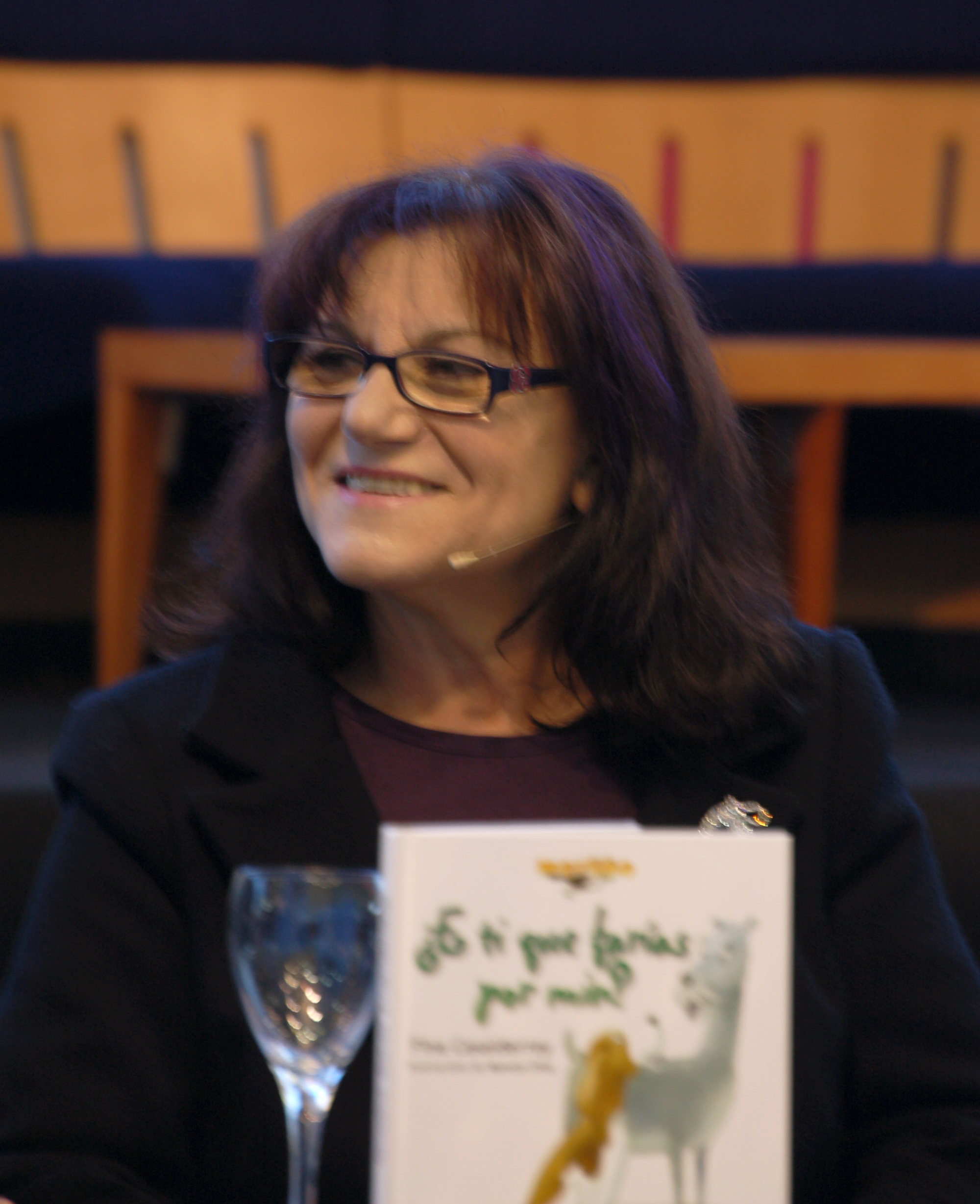 Fina Casalderrey na presentación de ¿E ti que farías por min? no CulturGal 2010 no Pazo da Cultura de Pontevedra Casalderrey, Fina